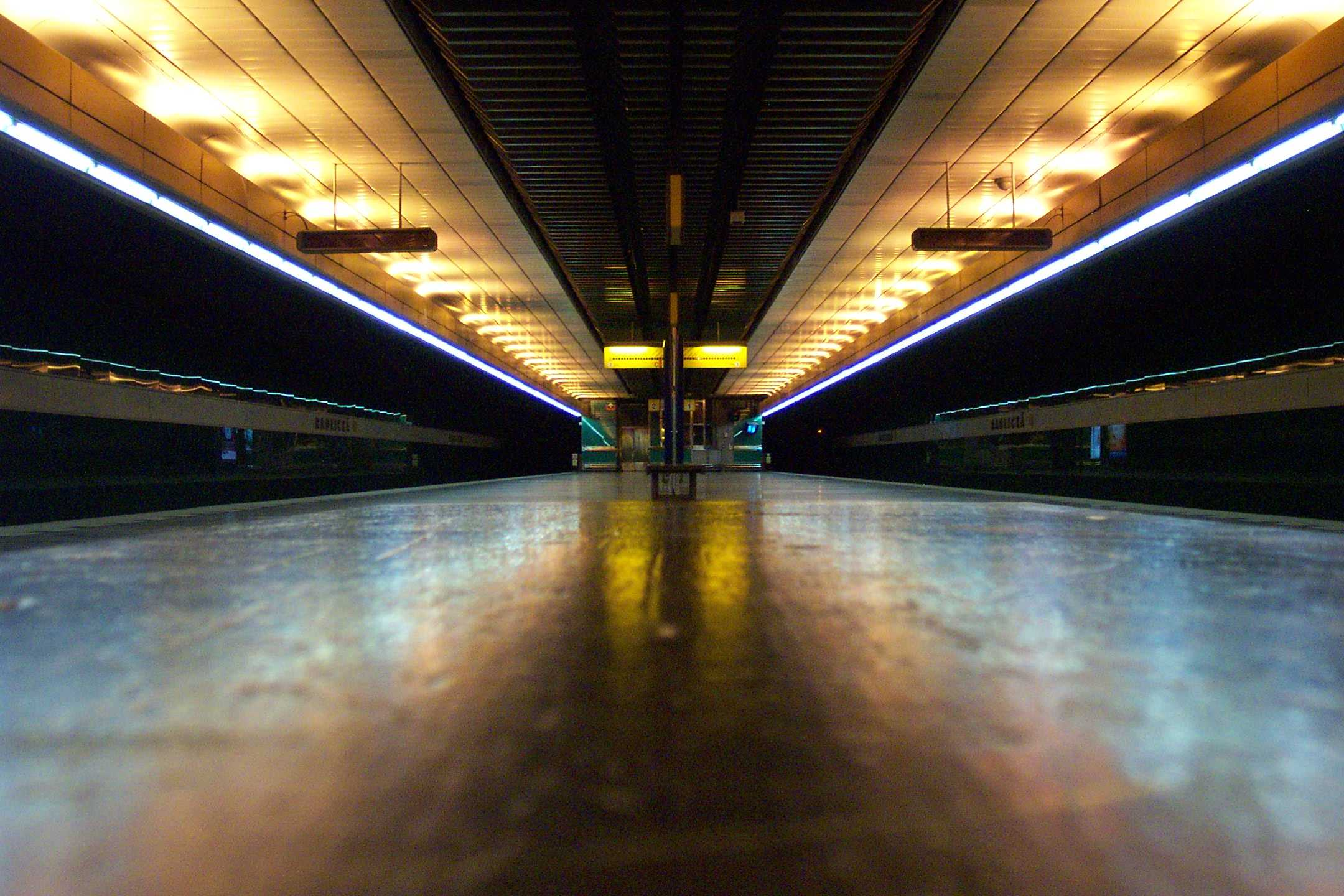 Prague metro station Radlická - Stanice pražského metra Radlická